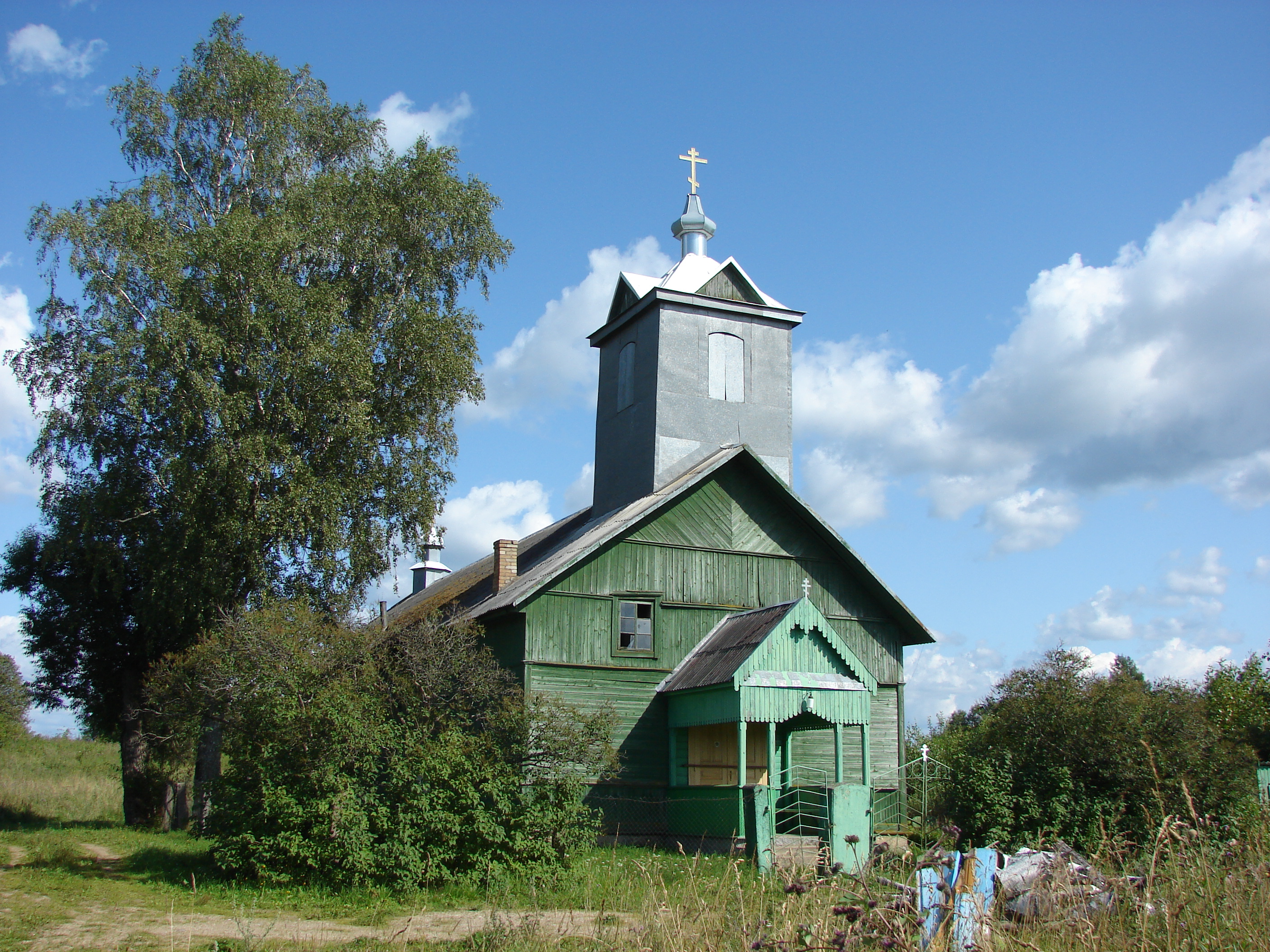 Kampišķu vecticībnieku lūgšanu nams Ozolaines pagastā.